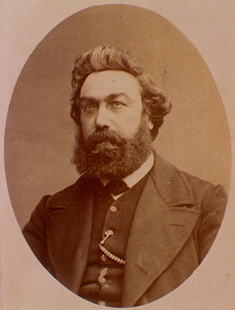 Augustin Verdure (1825-1873)